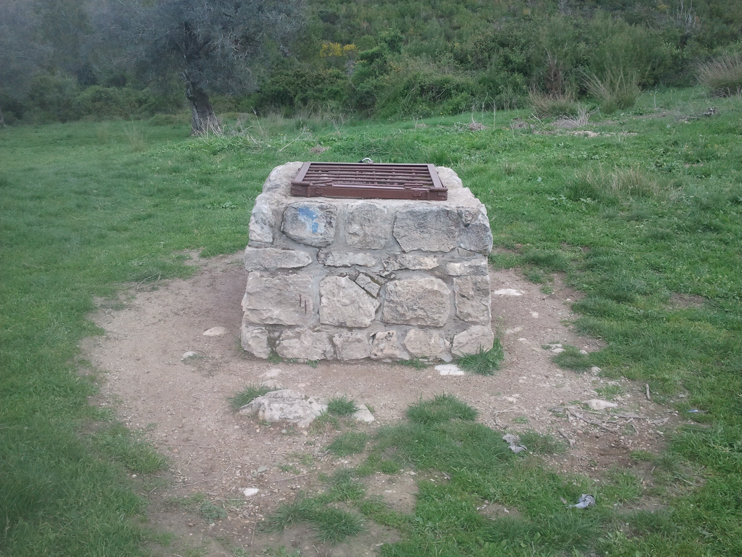 באר מים באחו ליד חורשת הארבעים על הר הכרמל. הבאר שימשה את מתיישבי "משמר הכרמל" שישבו באזור ממזרח לאוניברסיטת חיפה בין השנים 1943-1939